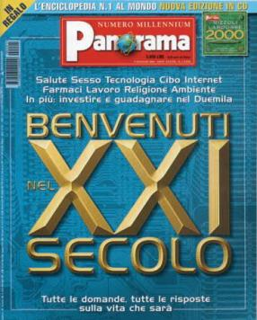 Copertina della rivista Panorama 2004, Arnoldo Mondadori Editore. La copertina reca la scritta Benvenuti nel XXI secolo.